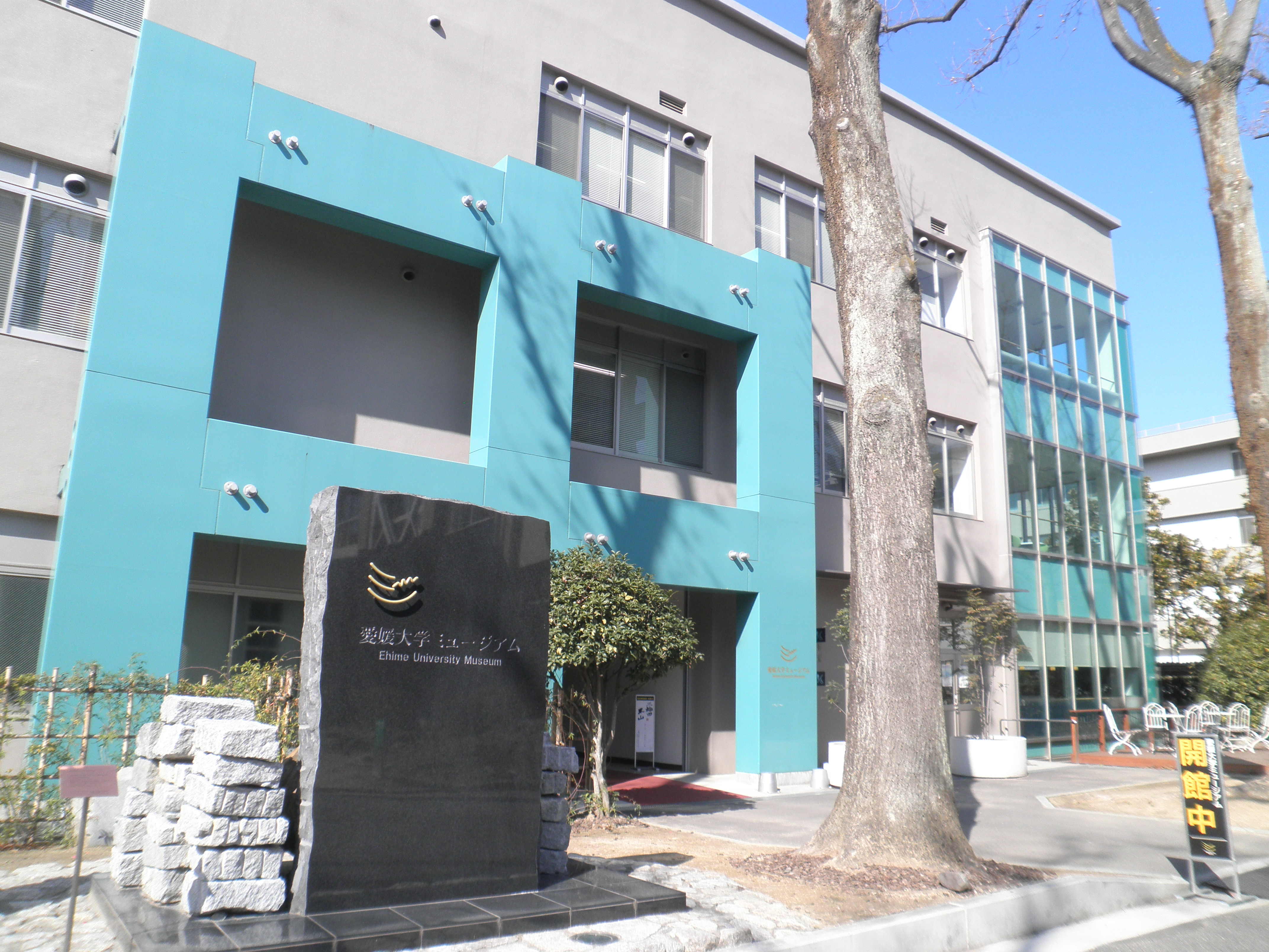 愛媛県松山市にある愛媛大学内にある愛媛大学ミュージアム